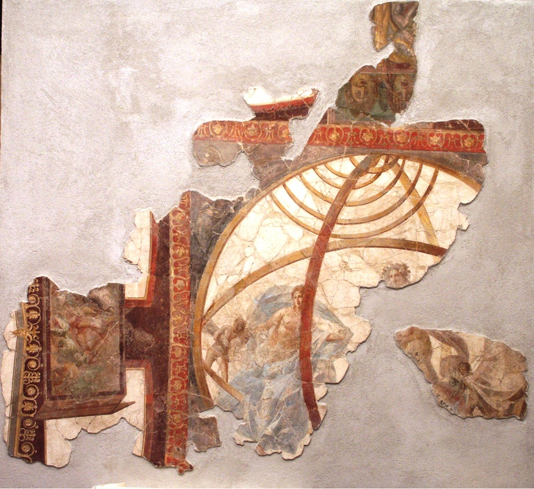 Affresco raffigurante il Planisfero, proveniente da Villa San Marco a Stabia e conservato all'Antiquarium stabiano